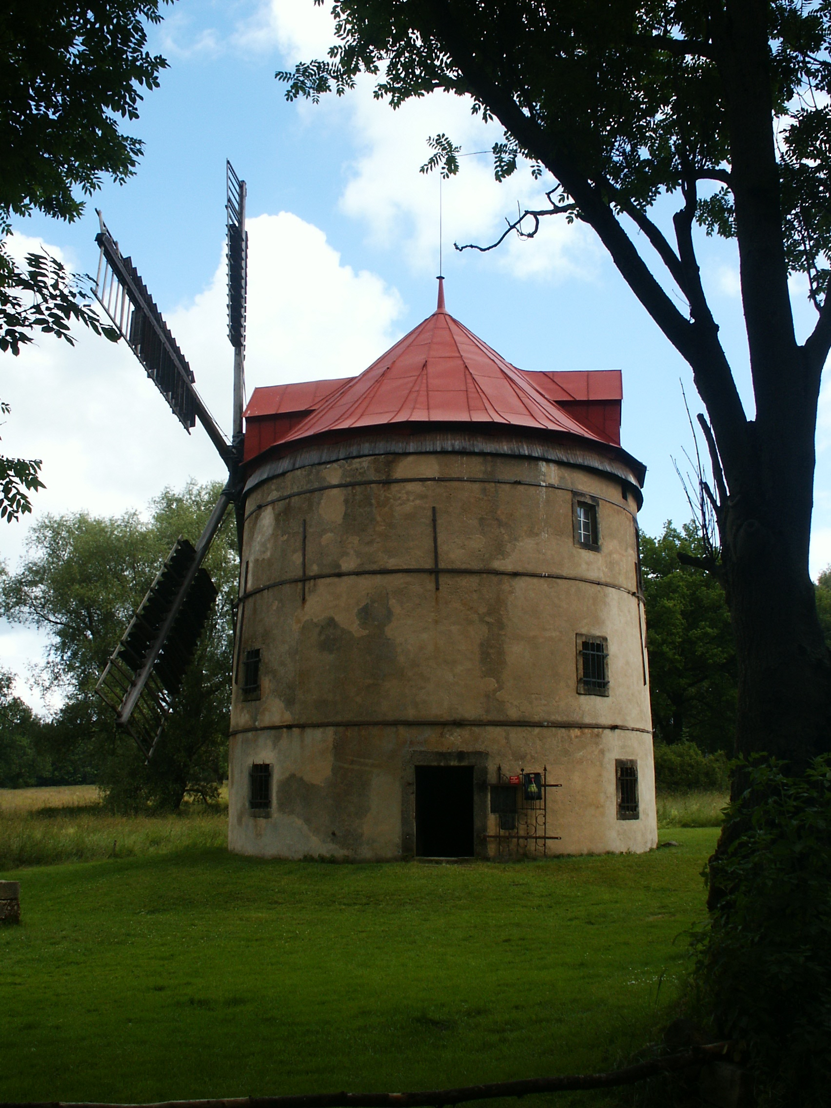 Větrný mlýn, Světlík, Horní Podluží.